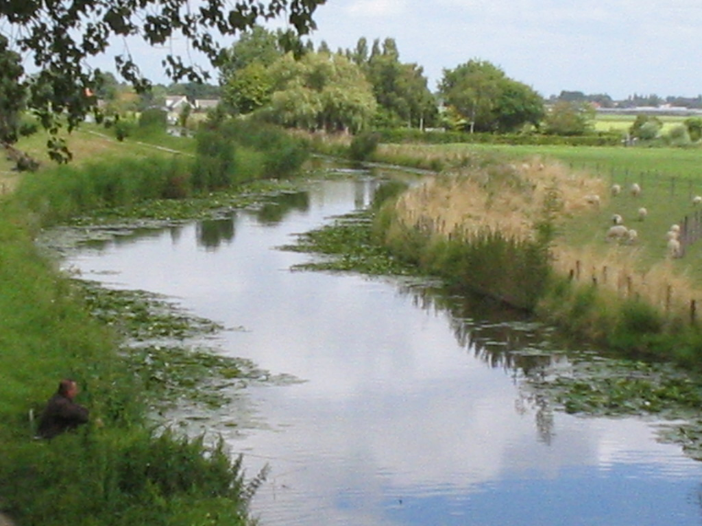 Berkelsche Zweth